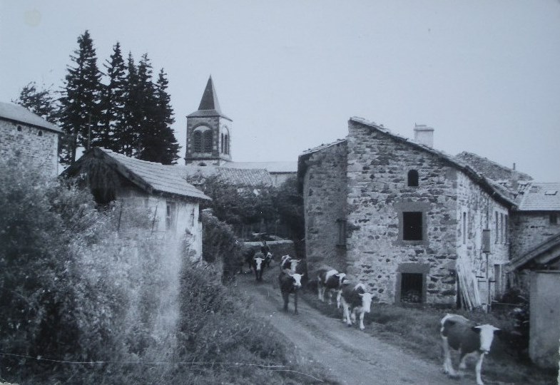 CPA 1960